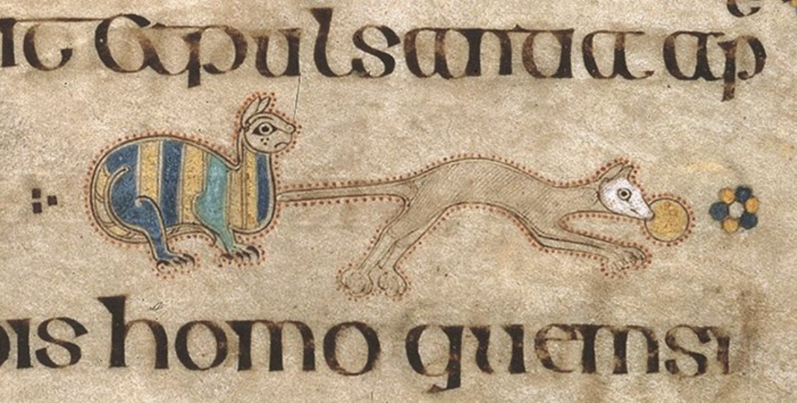 Ausschnitt aus einer Seite des Book of Kells: Katze und Maus (fol. 48r)